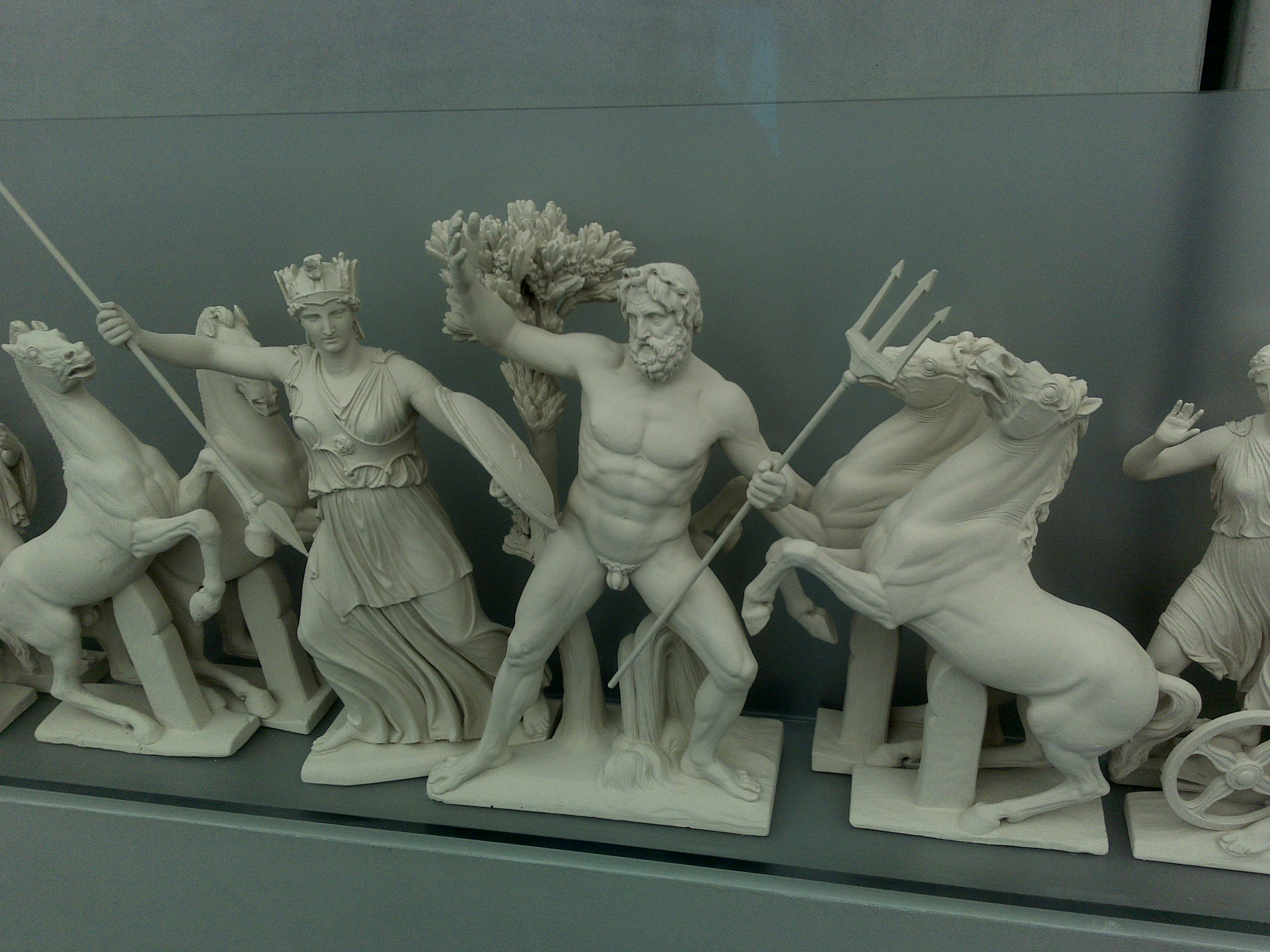 Acropolis Museum 2009